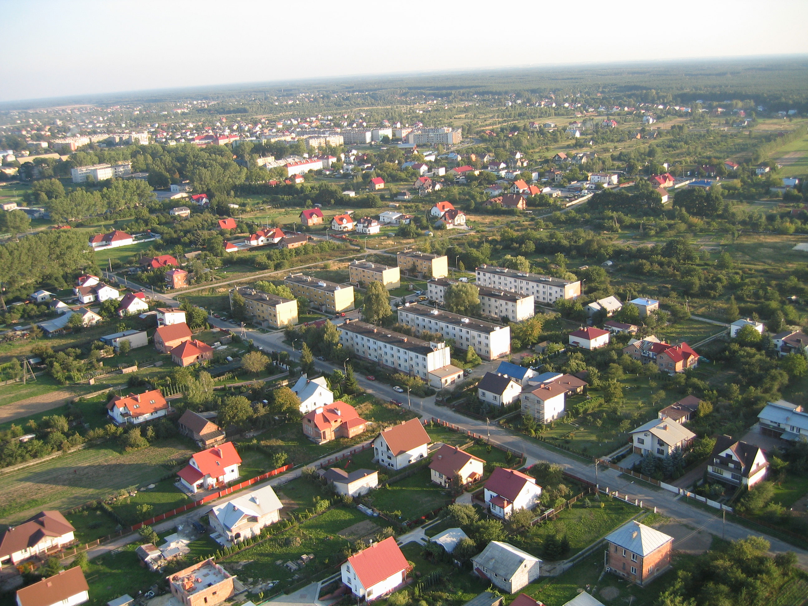 Nisko - widok na Osiedle, w oddali osiedle Tysiaclecie